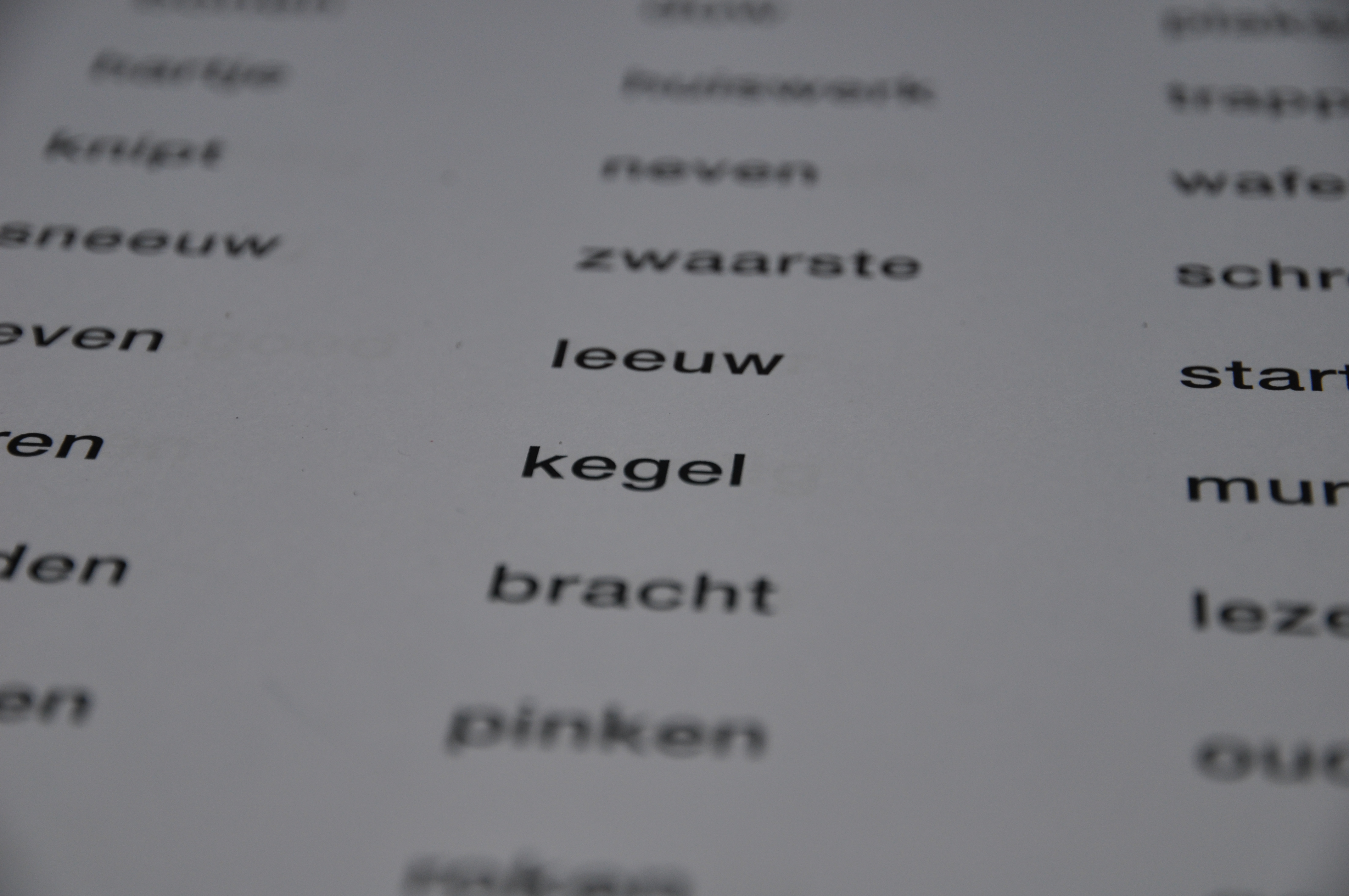 Woordrijtjes zoals die in de leesles in groep 3 gebruikt kunnen worden.